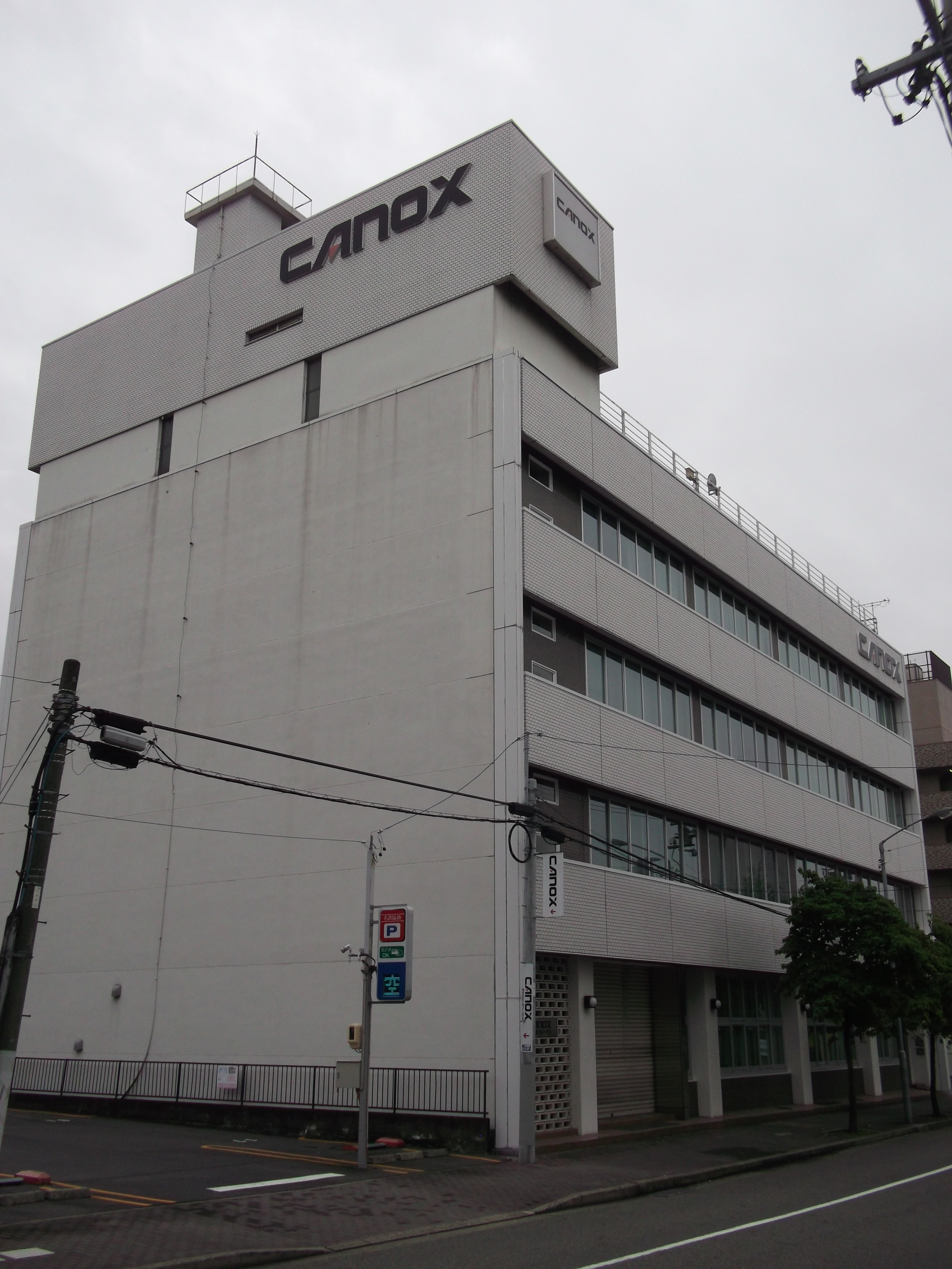 名古屋市西区那古野のカノークス本社ビルを西側公道北側より撮影